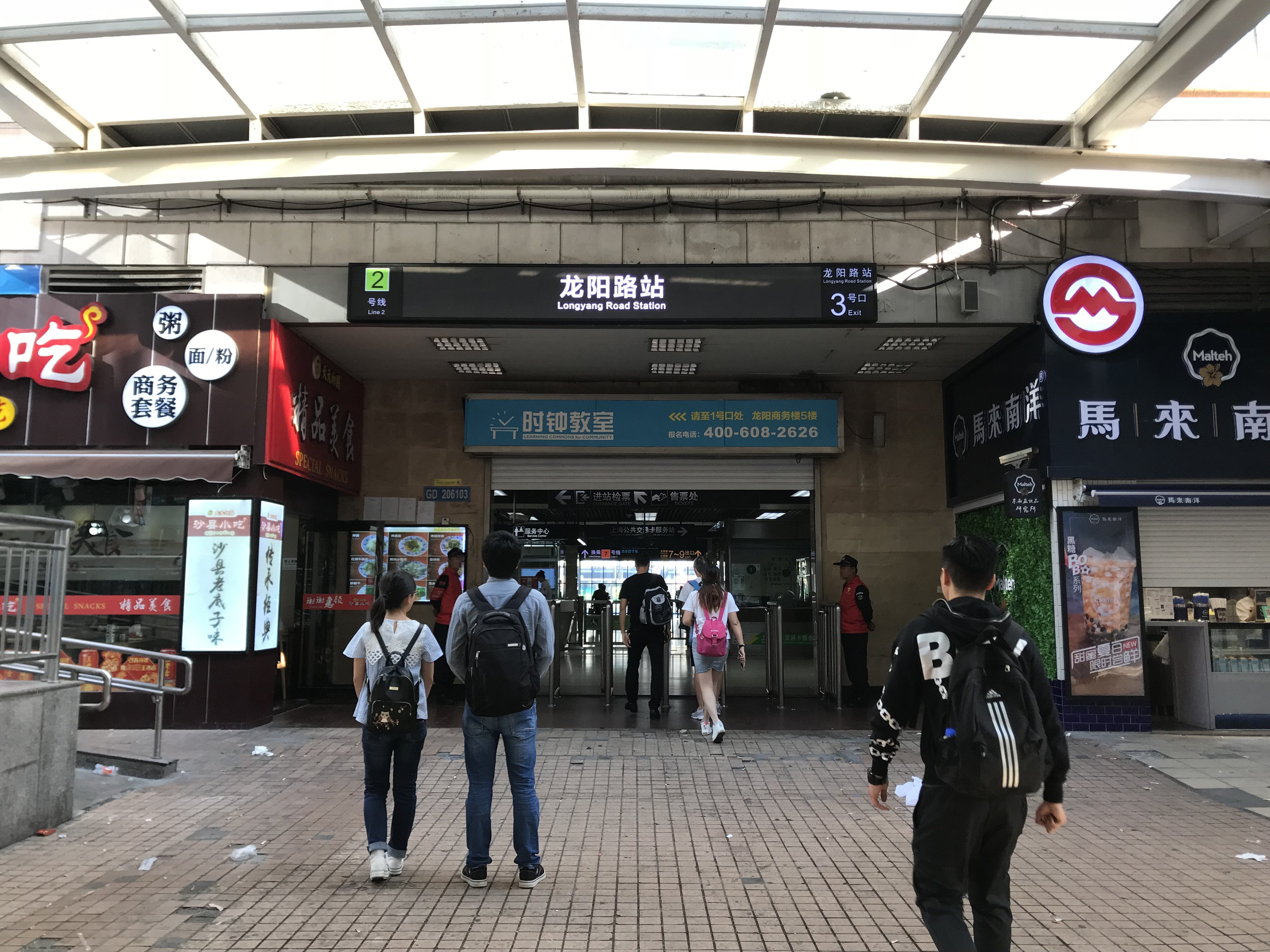 龍陽路駅(上海地下鉄)の3番出入り口